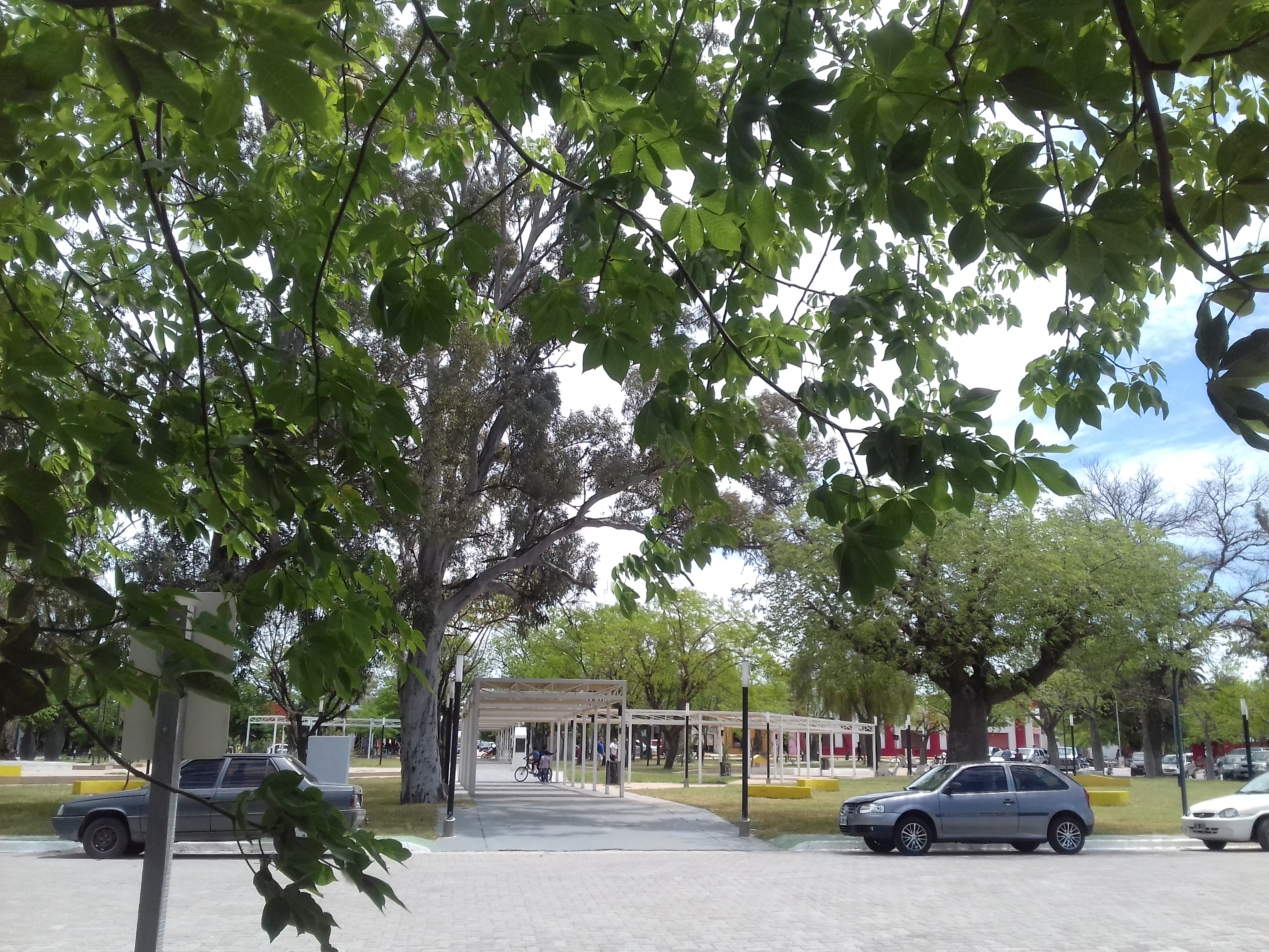 Plaza Ubicada en el Centro de la Ciudad de Sumampa.